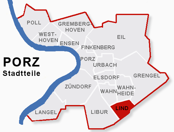 Lage des Stadtteils Lind im Stadtbezik Porz